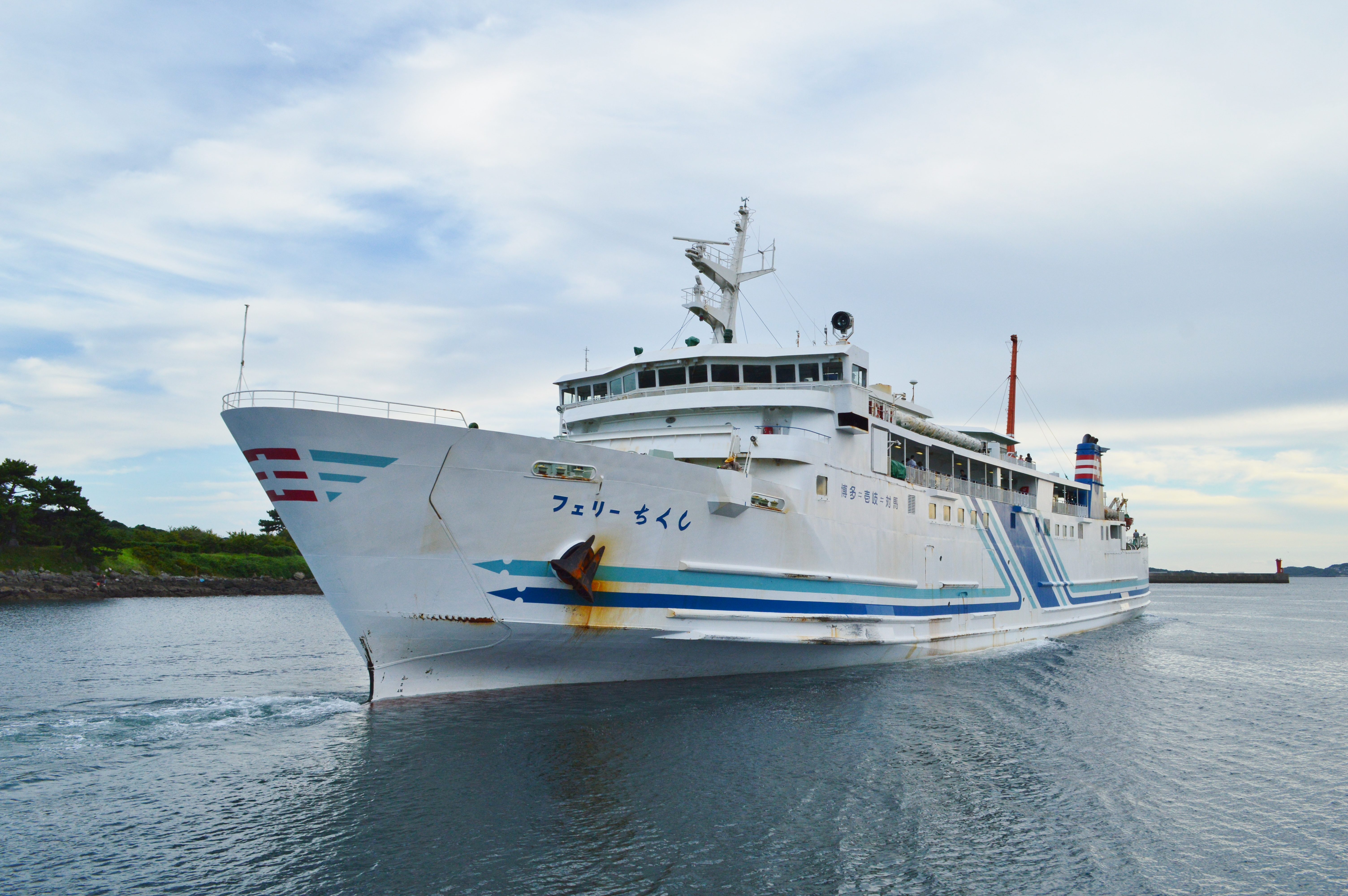 フェリーちくし (郷ノ浦港にて)